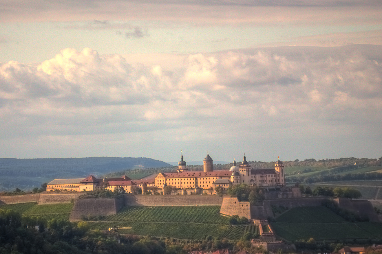 Festung Marienberg oberhalb Würzburgs in Unterfranken, Bayern.